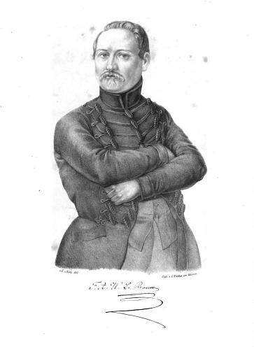 Porträt von Friedrich August Wilhelm Ludwig Roux